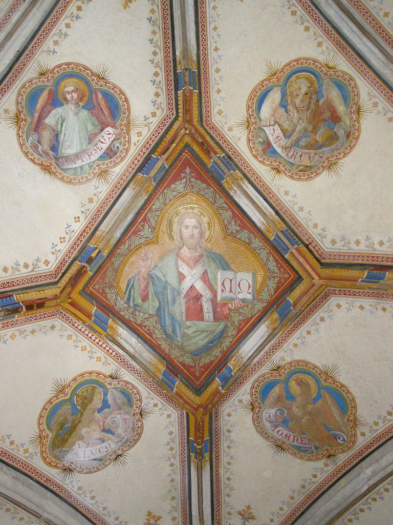 Stropný svorník s Ježišom Kristom a atribútmi štyroch evanjelistov